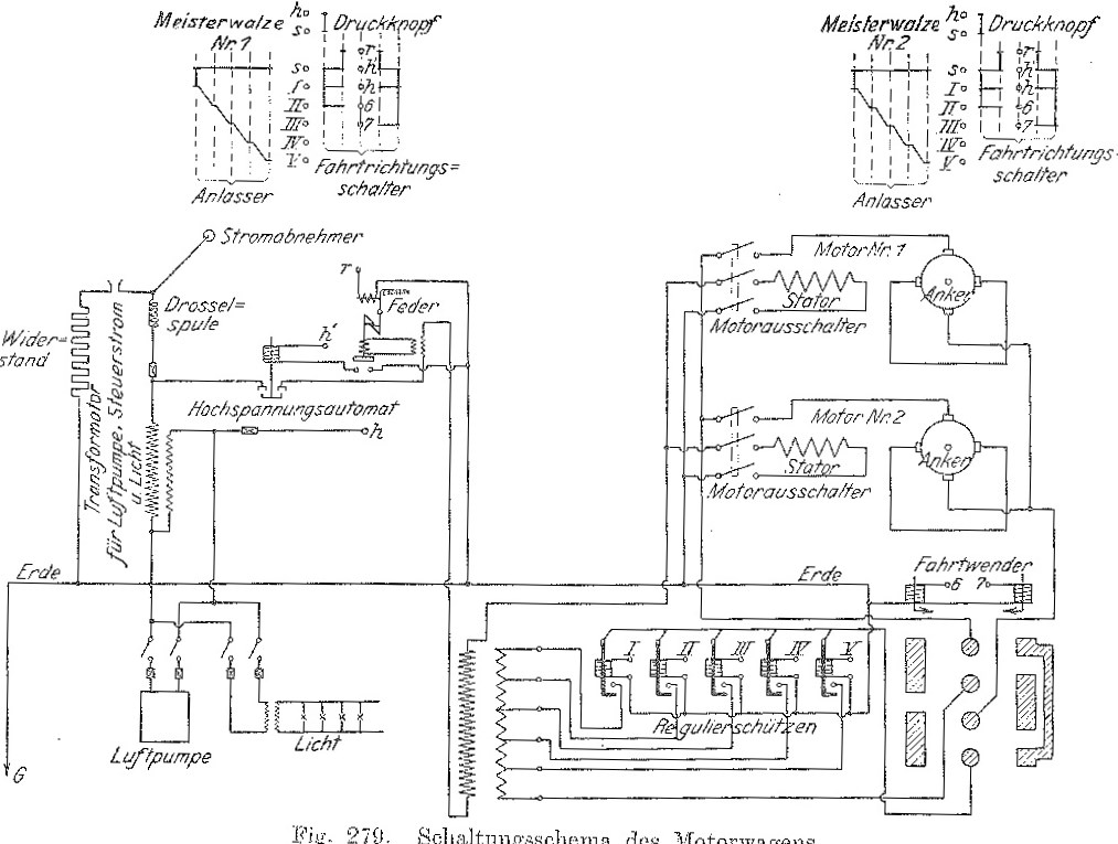 Schaltschema des Winter-Eichberg-Motors bei dem KPEV 2051-2052